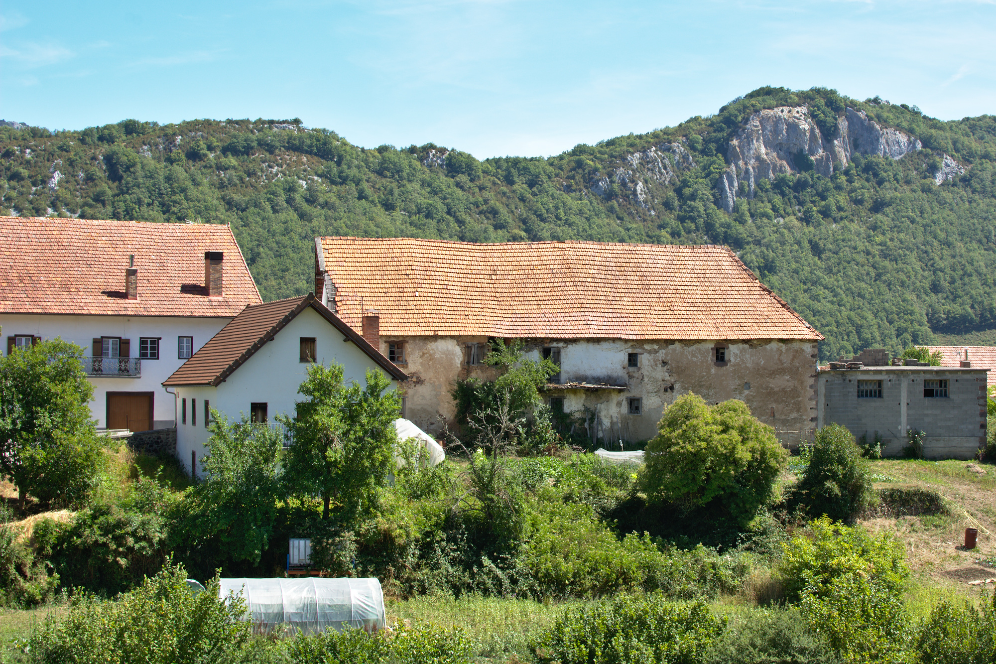 Garayoa